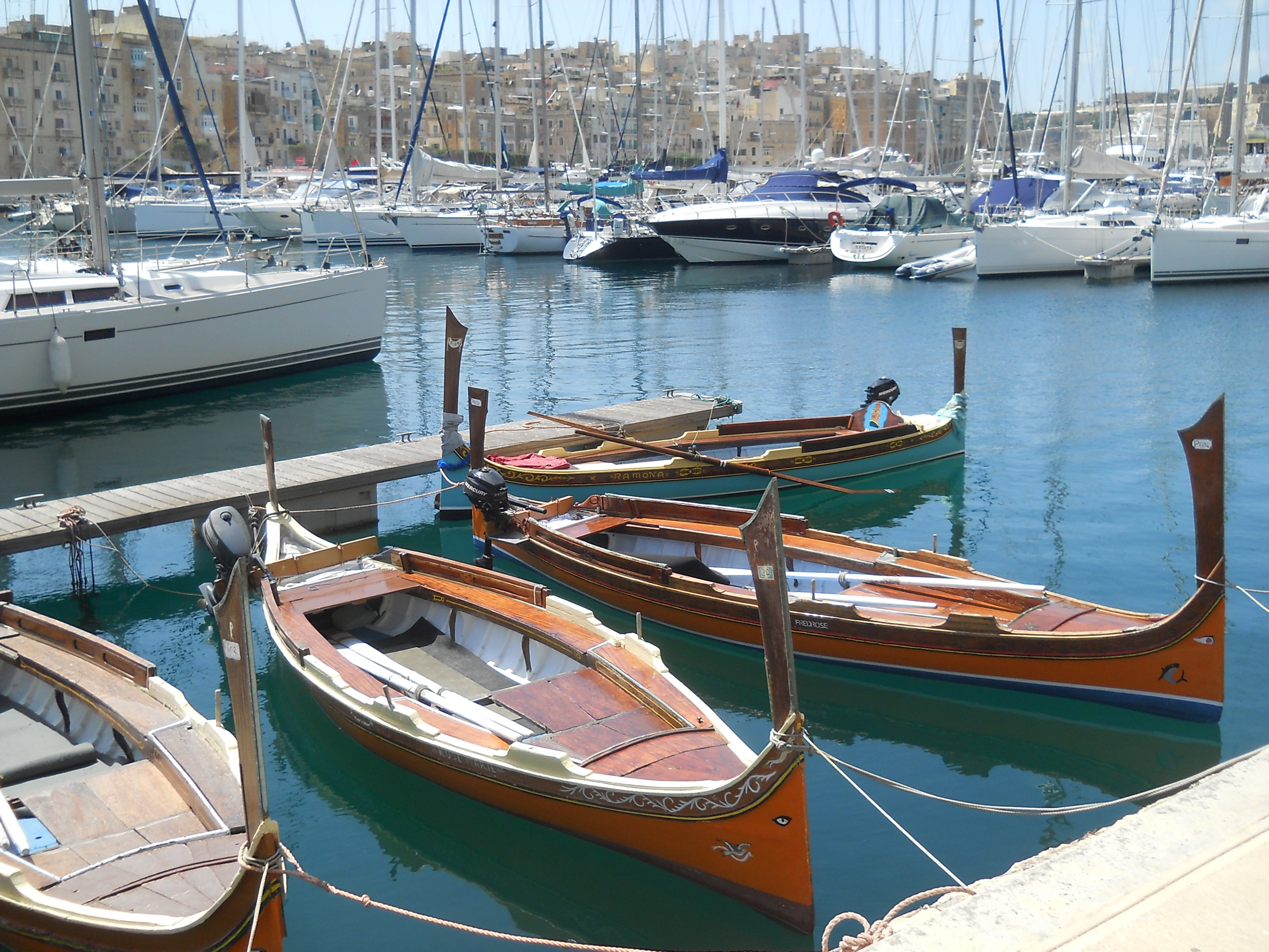 Am Museumspier in Vittoriosa liegen traditionelle maltesische Fahrzeuge